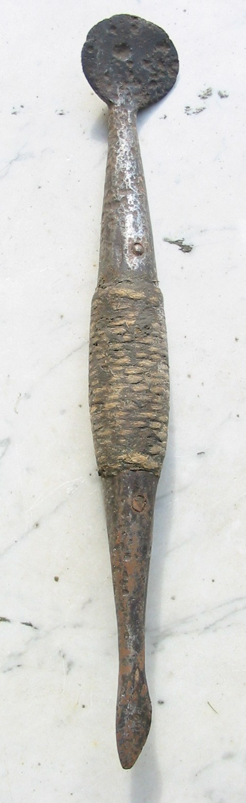 Werkzeug zum Schälen der Eichenrinde, Gerberlohe